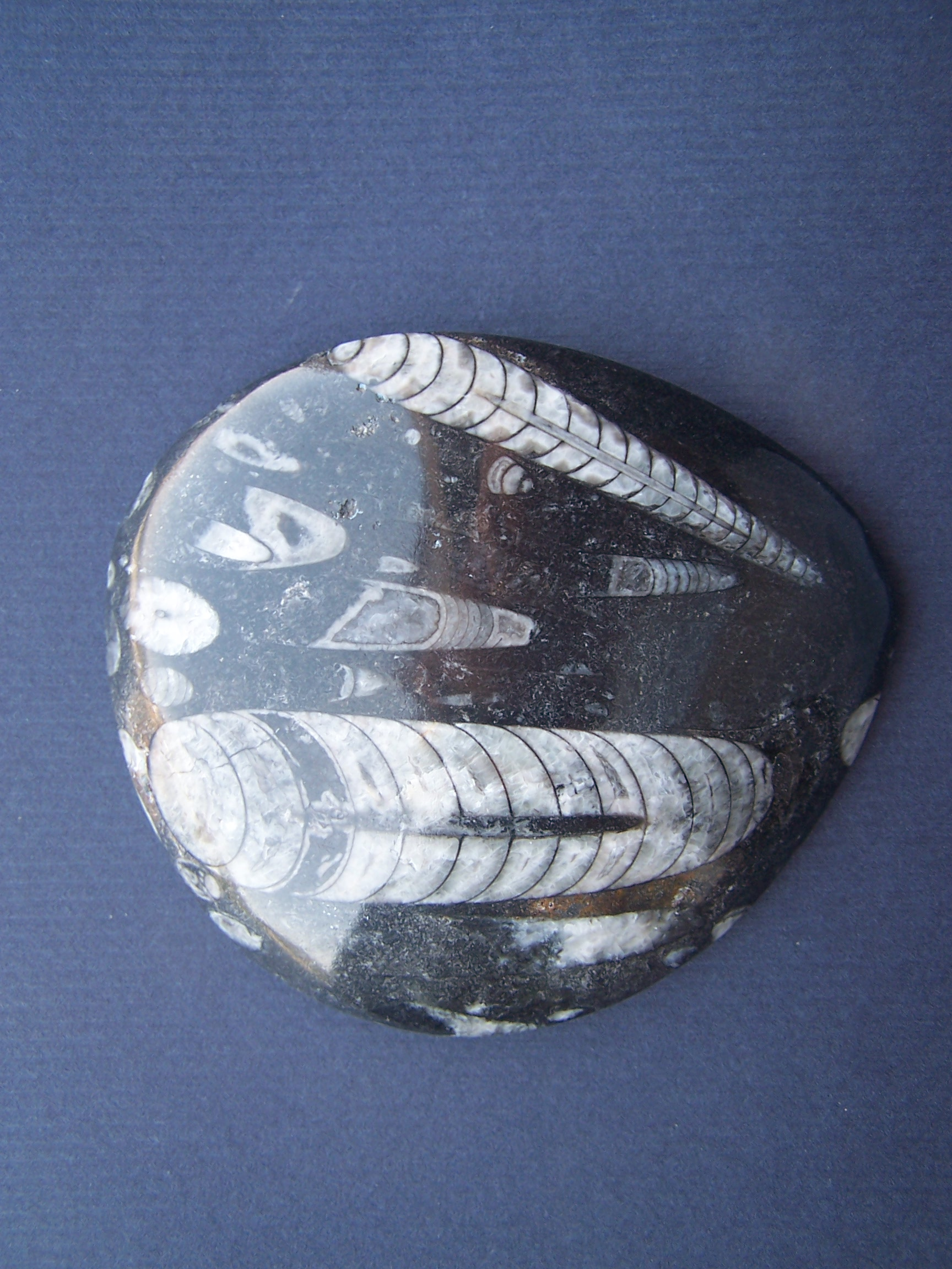 Fósil de orthoceras, origen: Marruecos